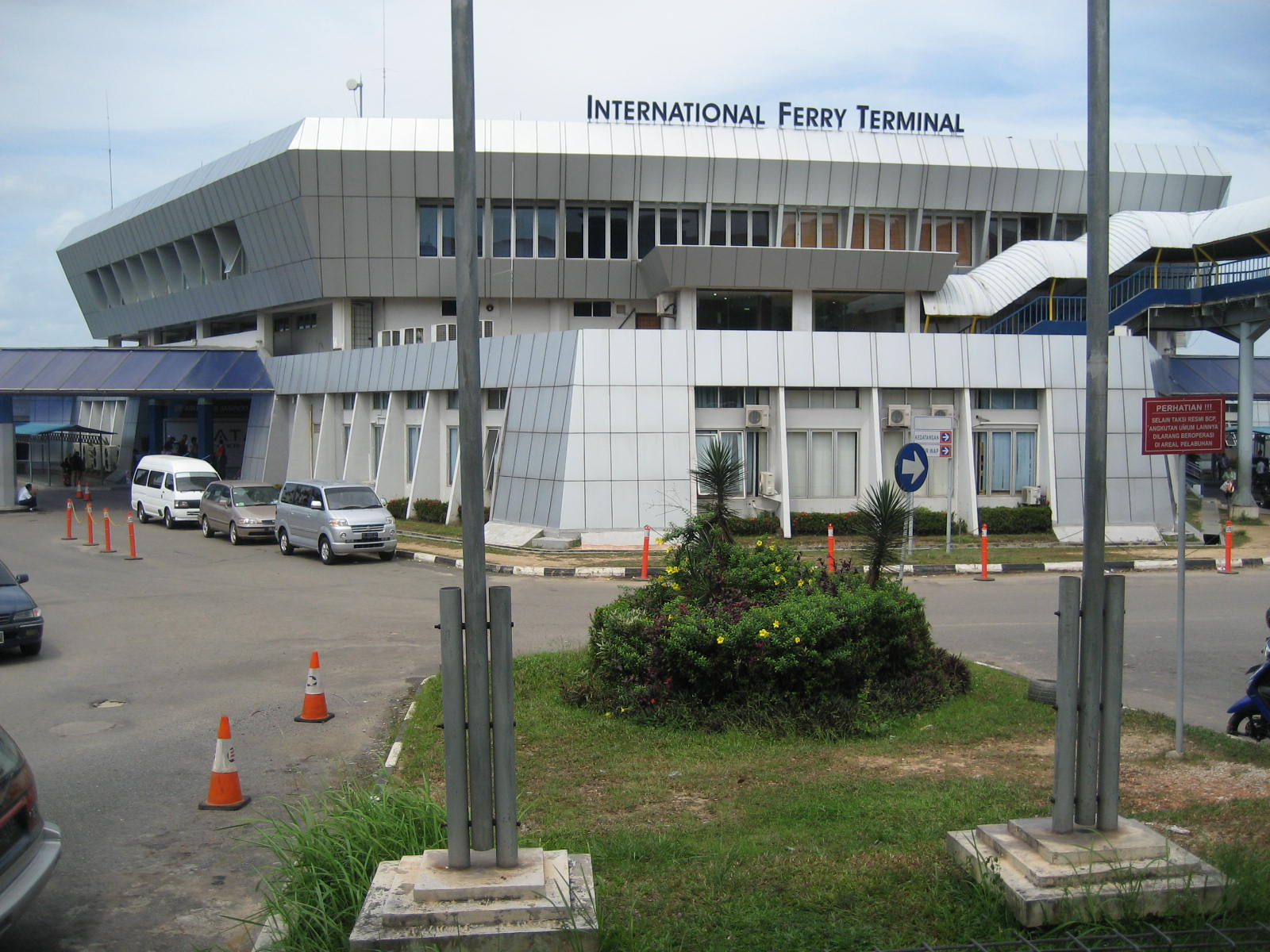 Description=International ferry terminal, batam center Source=own-work Date=26 January 2008 Author= Pengguna:Masgatotkaca